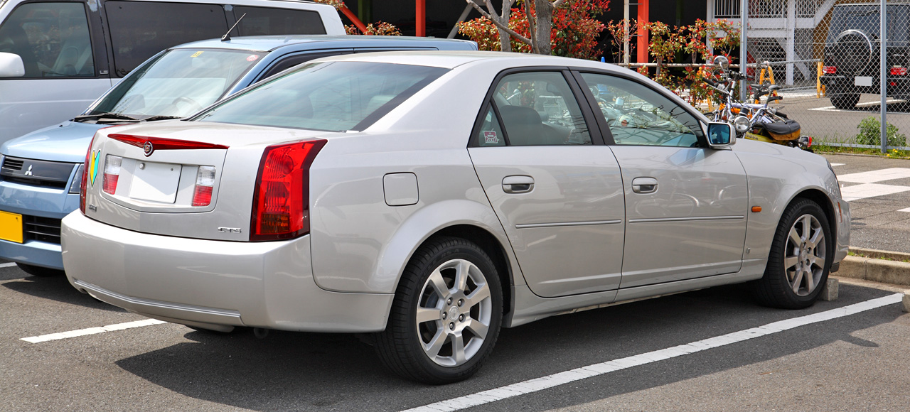 Cadillac CTS